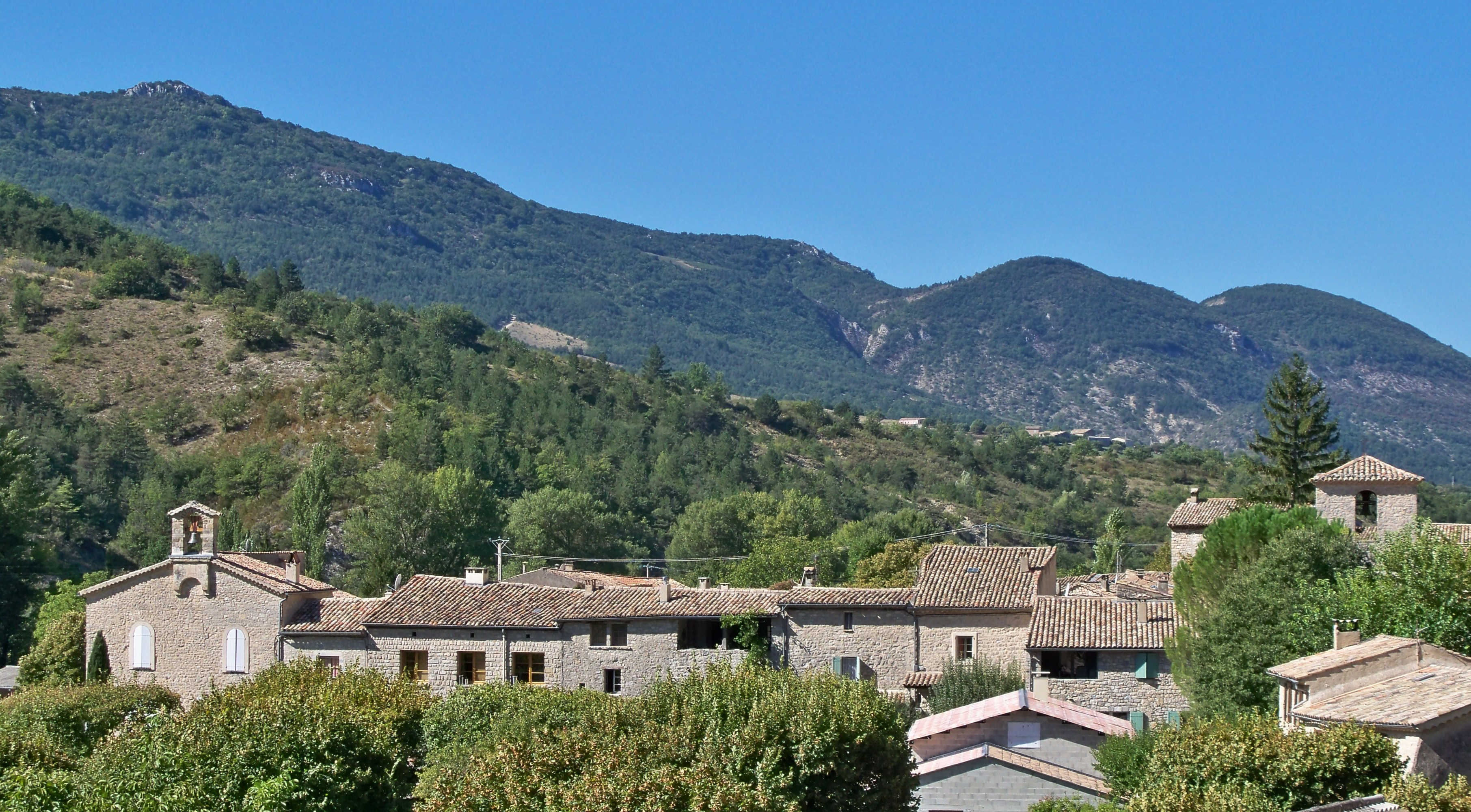 Sainte-Euphémie-sur-Ouvèze (Drôme, France). Vue d'ensemble, avec l'église Sainte-Euphémie à droite et le temple protestant à gauche ; entre les deux, façades sur la rue du Levant.